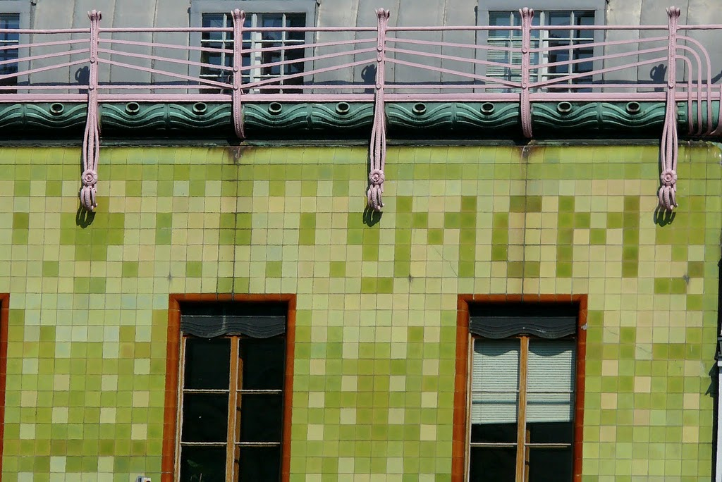 Wohn- und Geschäftshaus, Haus Portois & Fix/Fabianihaus